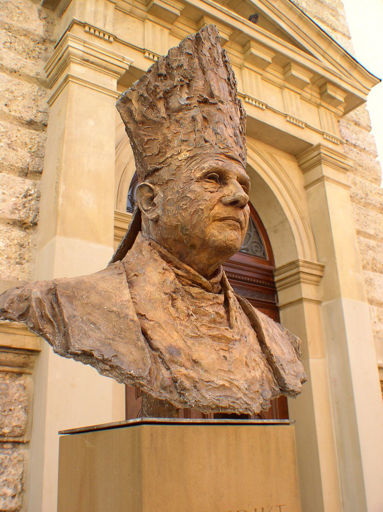 Büste Papst Benedikt XVI. in Traustein